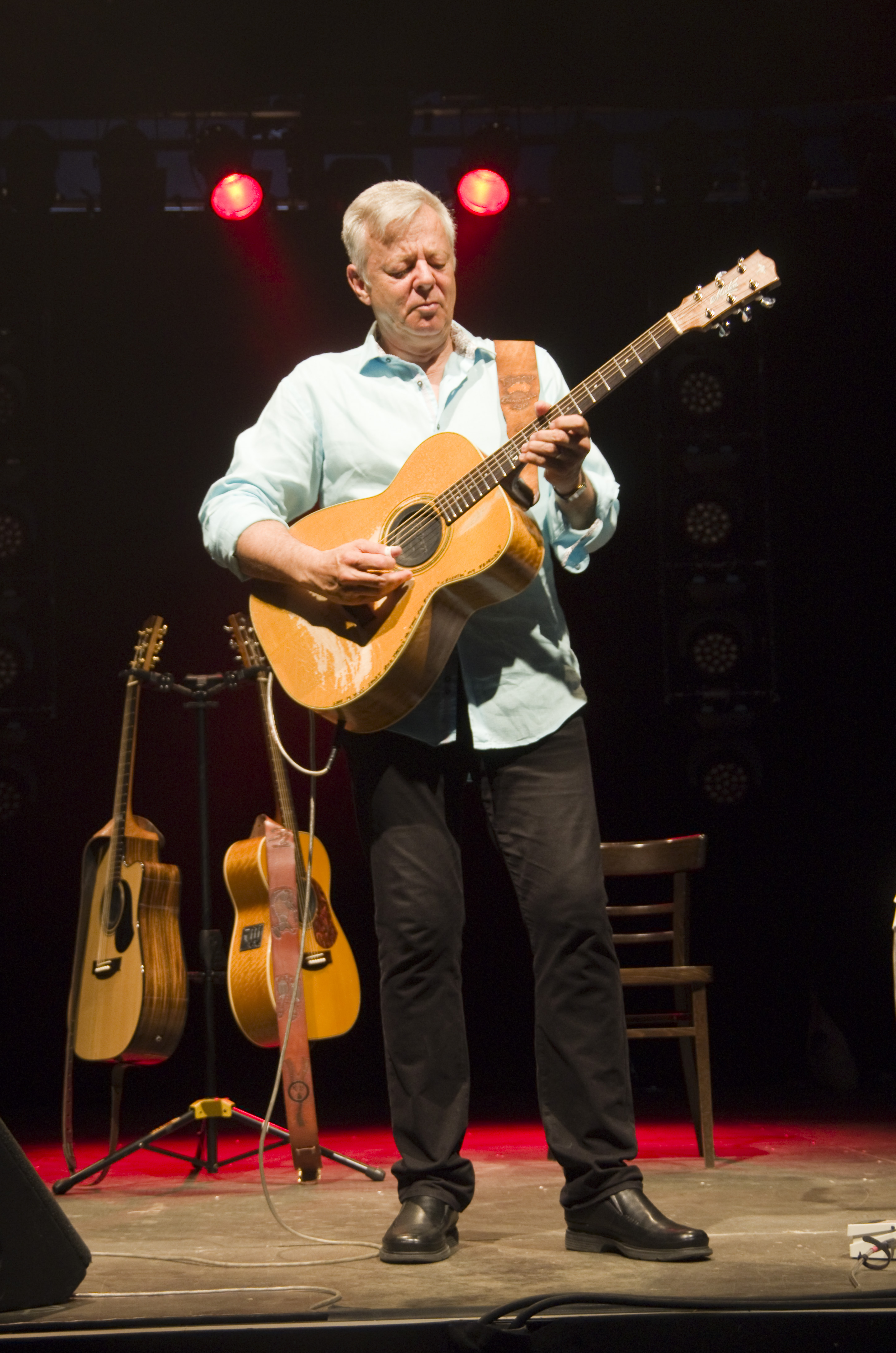 Das Zelt-Musik-Festival 2015 in Freiburg im Breisgau. 05.07.2015 Tommy Emmanuel